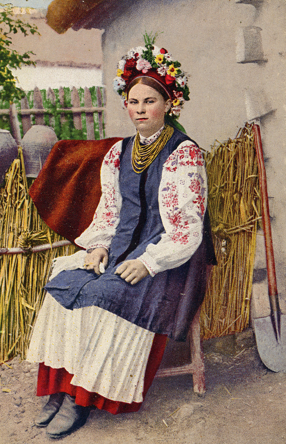 »Ukrainian type« – Divchyna v kvitkakh.